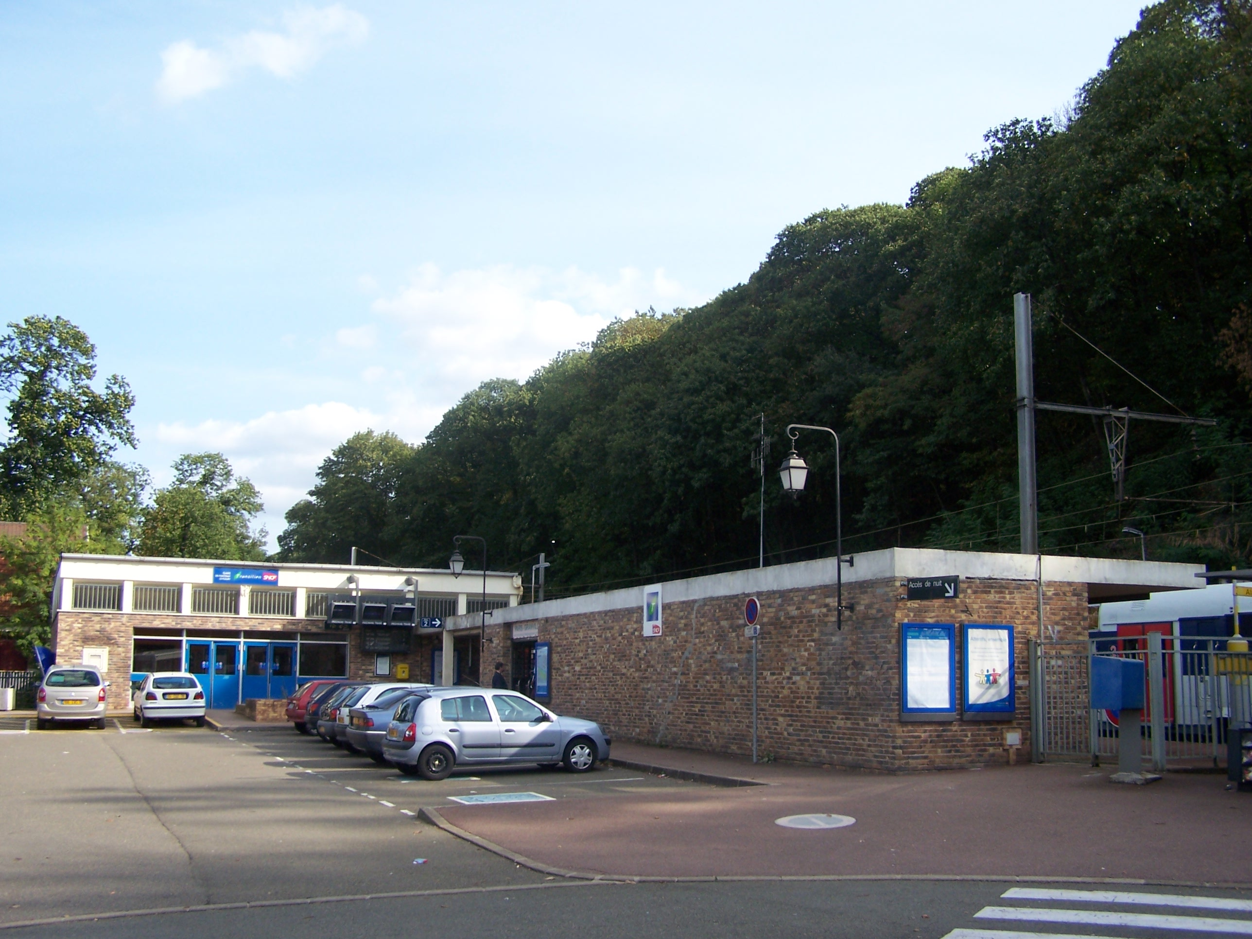 Gare de Fontenay-le Fleury (Yvelines, France)